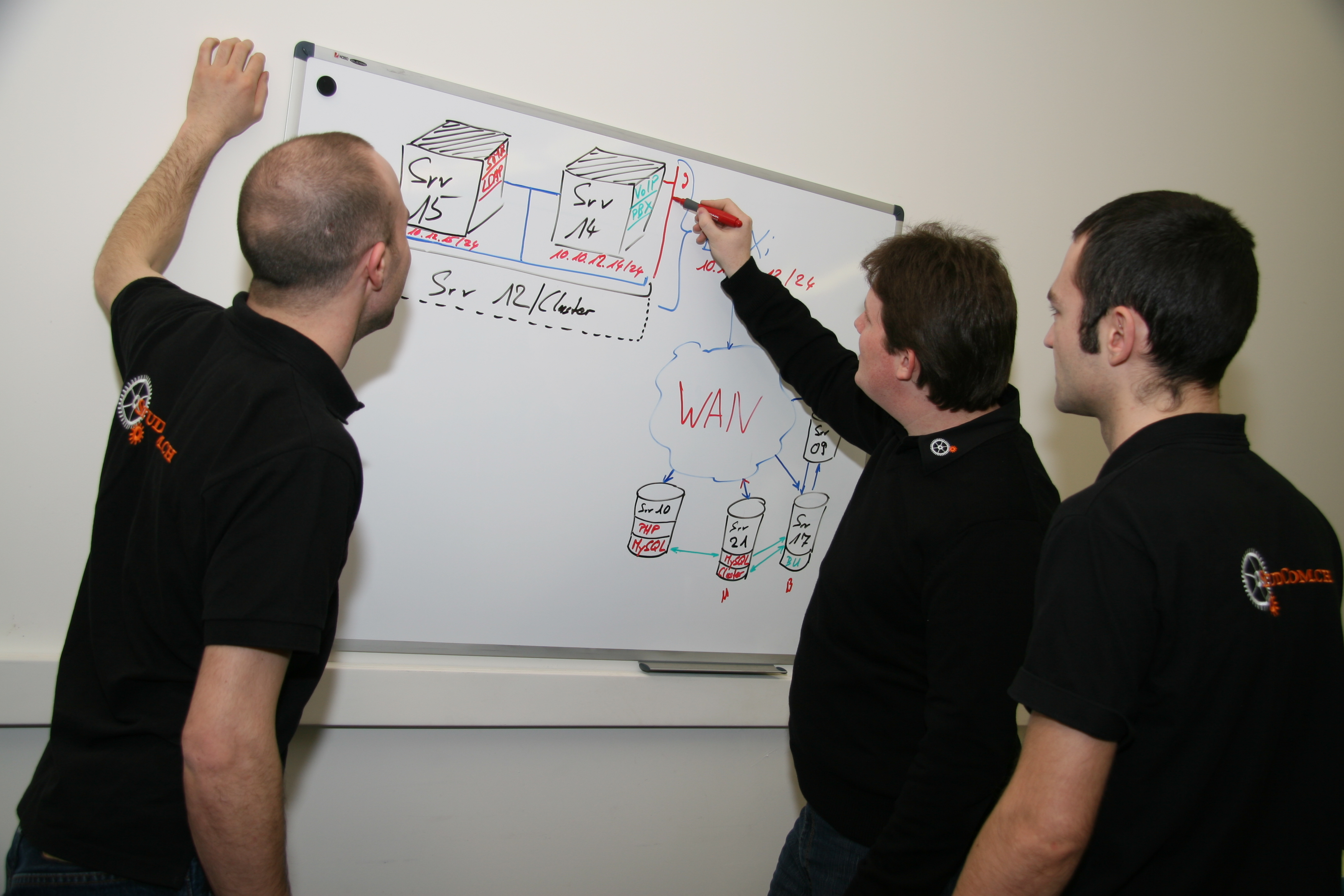 Projektbesprechung Hosting